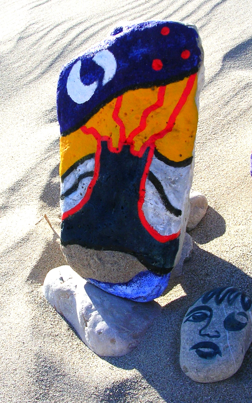 Mehdi Clemeur Land Art, Photo peinture, 2005